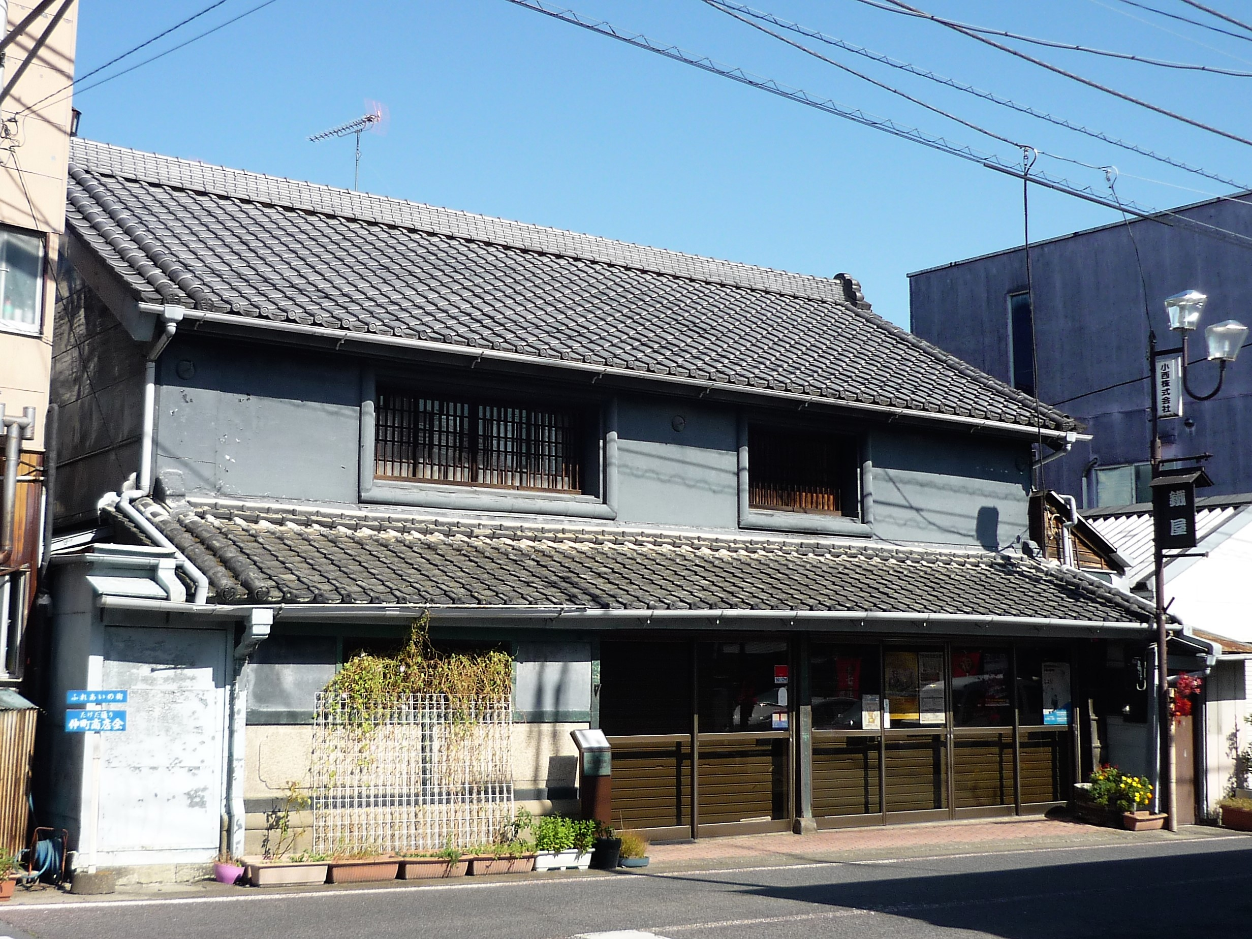 小西見世蔵（結城市） Panasonic Lumix DMC-FS3